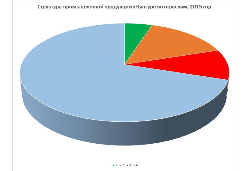 Структура промышленного производства в городе Кунгуре, Пермский край, в 2015 году